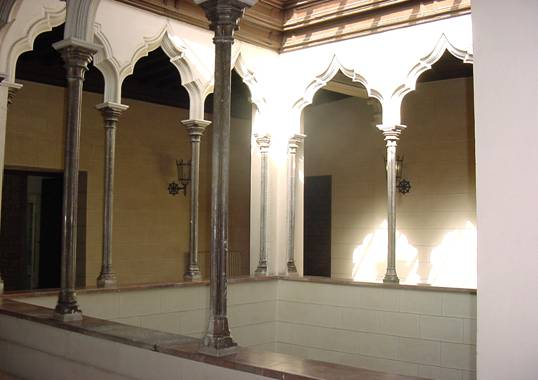 Patio renacentista